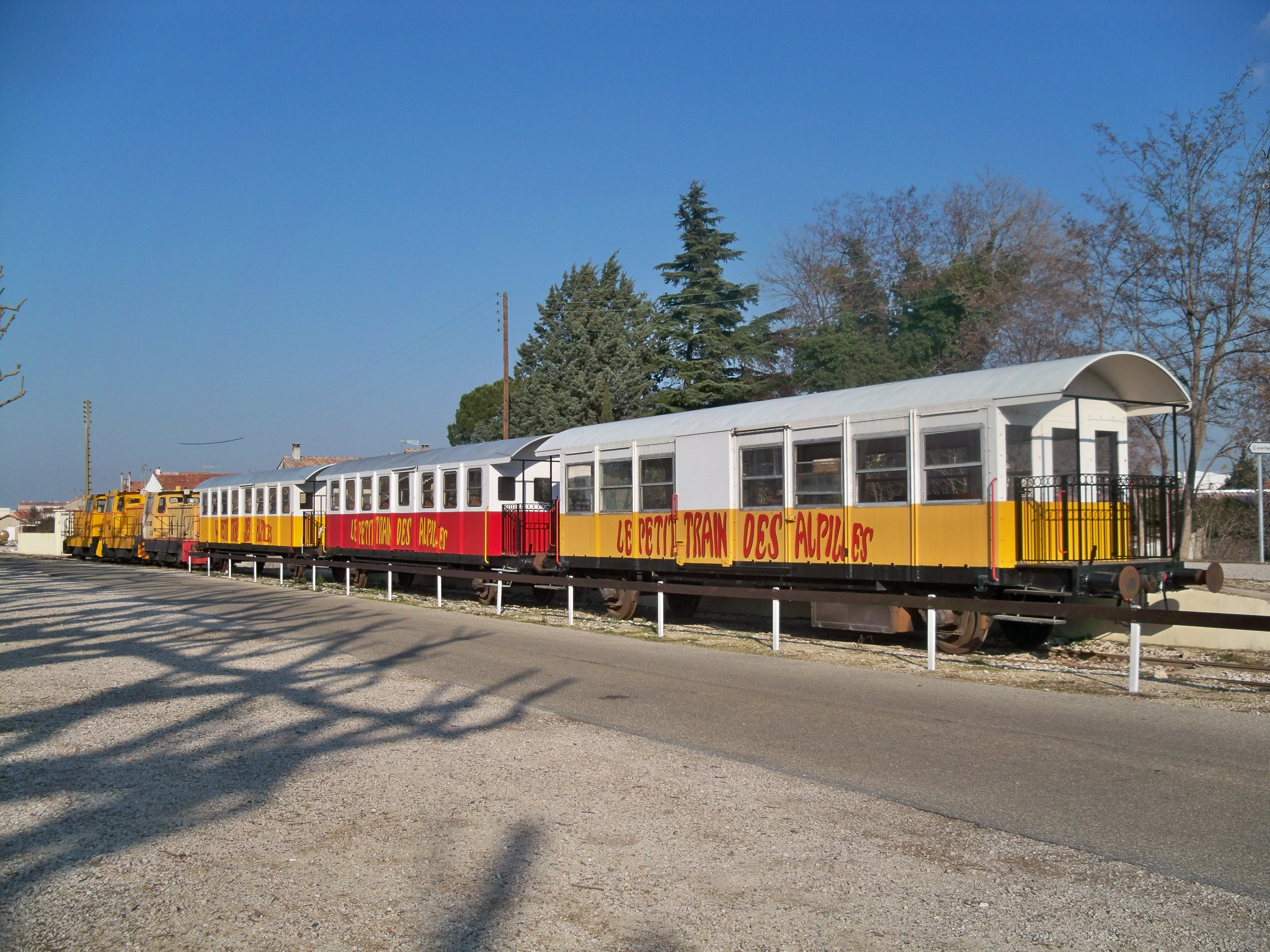 Petit train des Alpilles à Arles (13), Arles - Fonteville